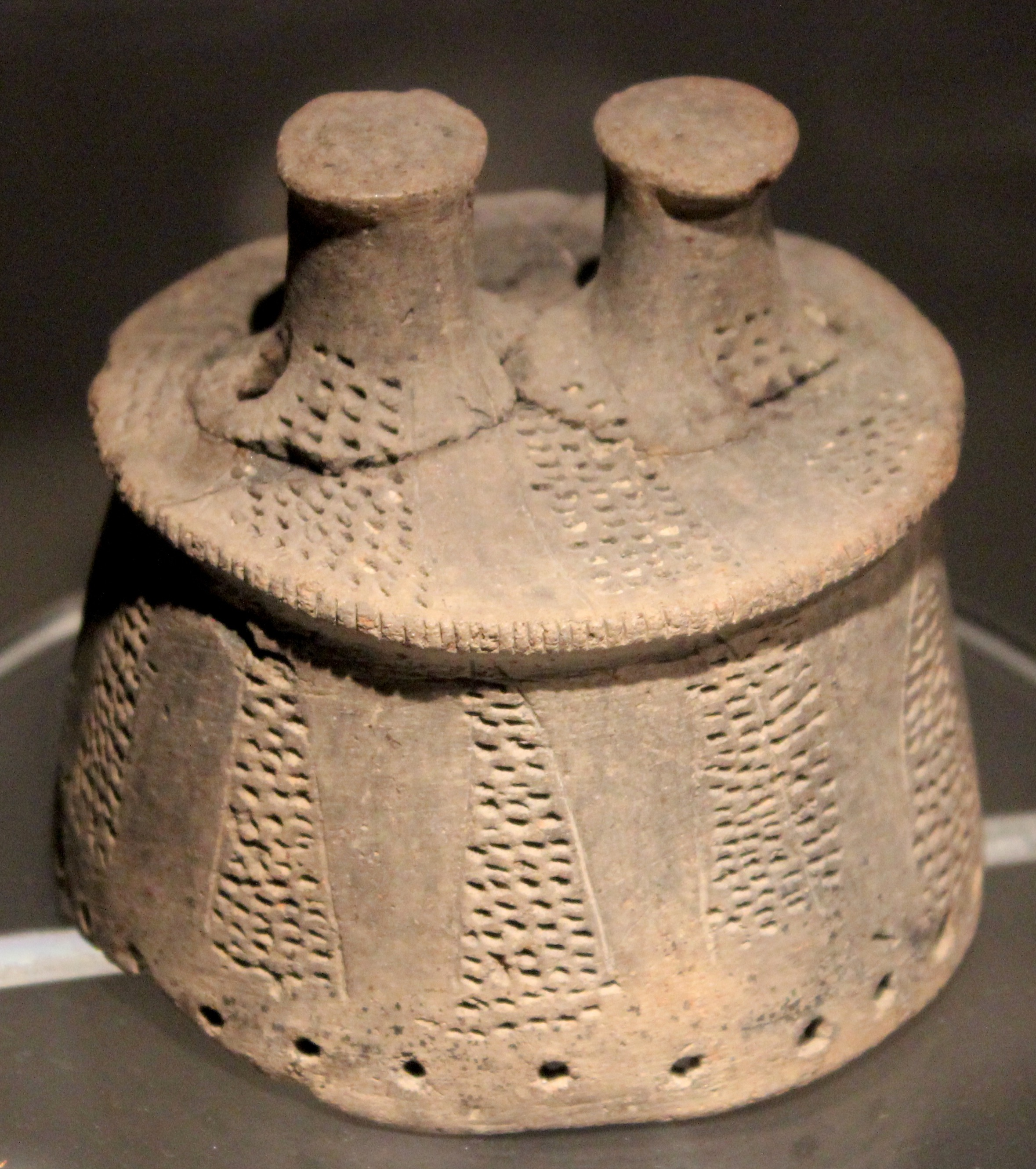 Paestum. Museo Archeologico Nazionale. Cerámica de la cultura del Gaudo.